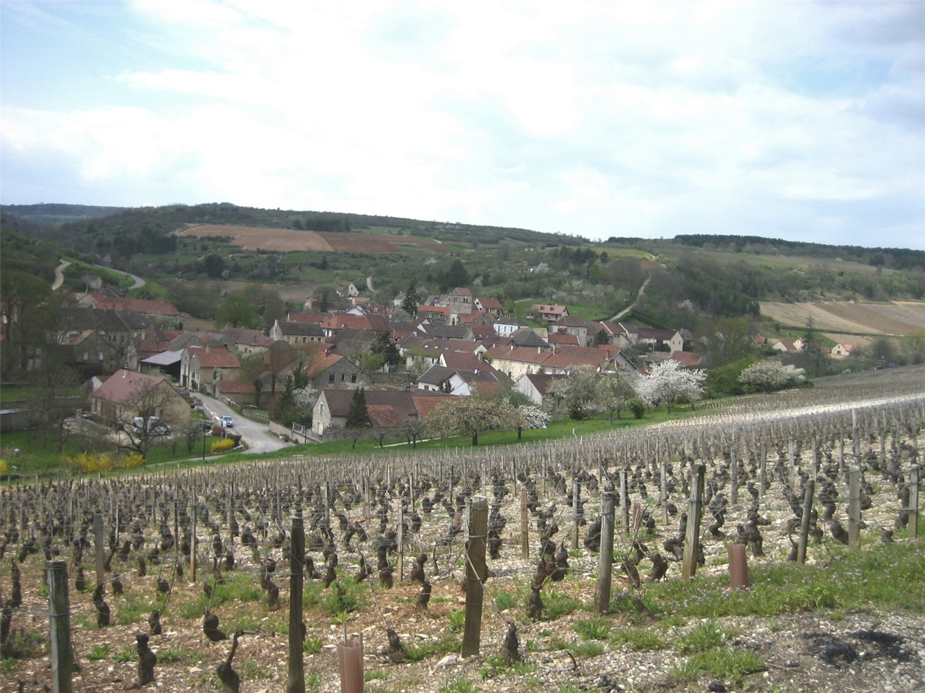 Nantoux, département de la Côte-d'Or